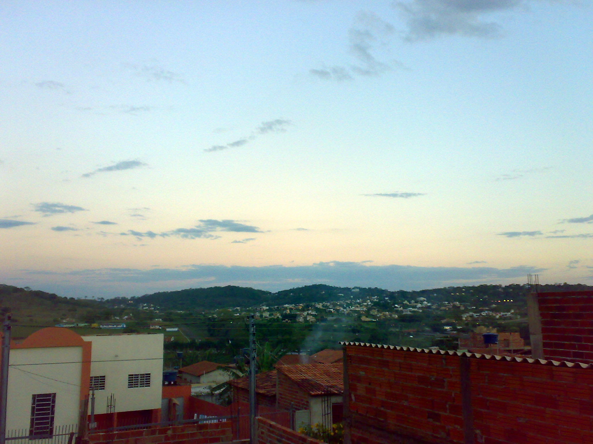 Fim do dia no Bairro Vale dos Sonhos, em Goiânia, Goiás.